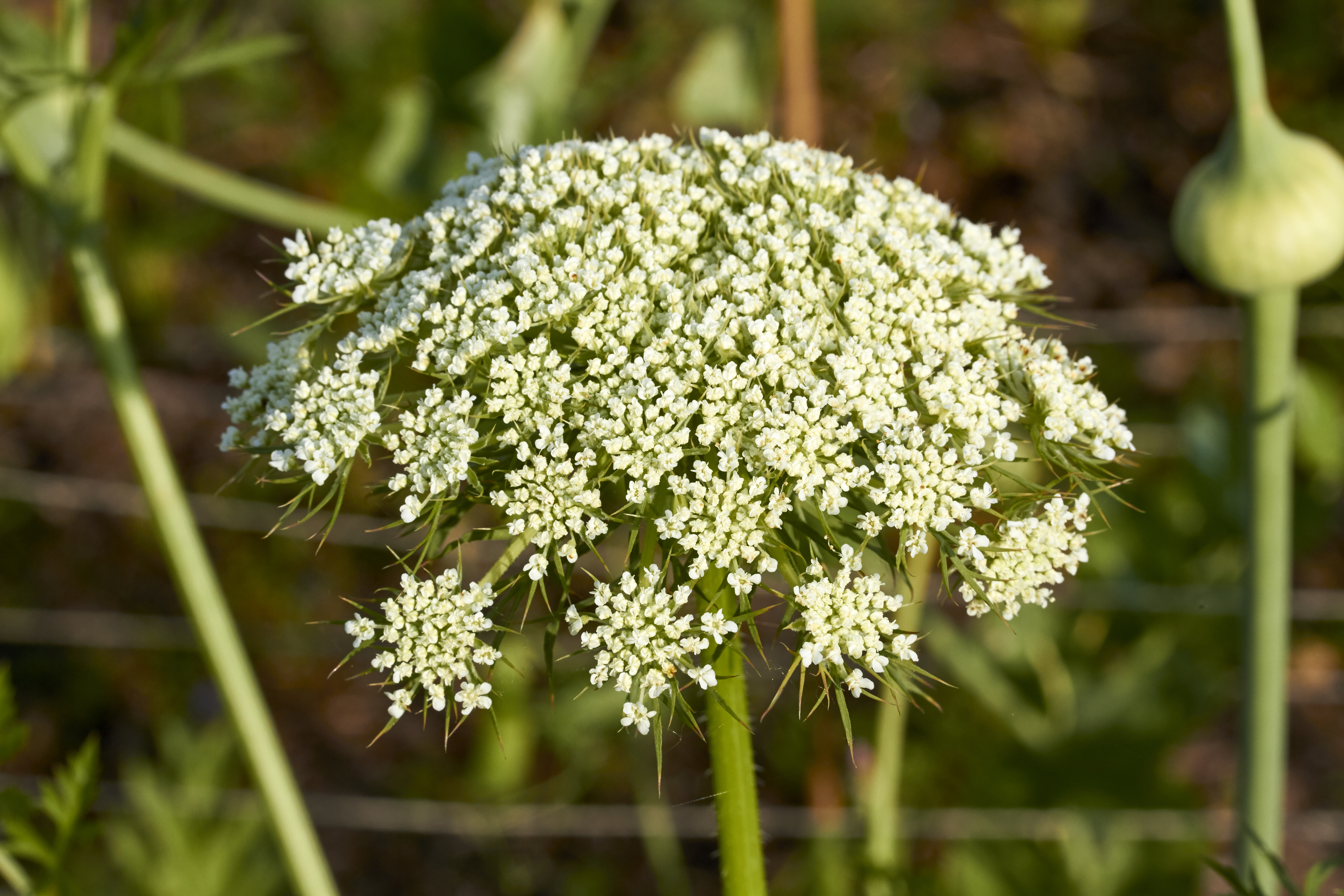 Geöffnete Büte einer Möhre (Daucus carota subsp. sativus)